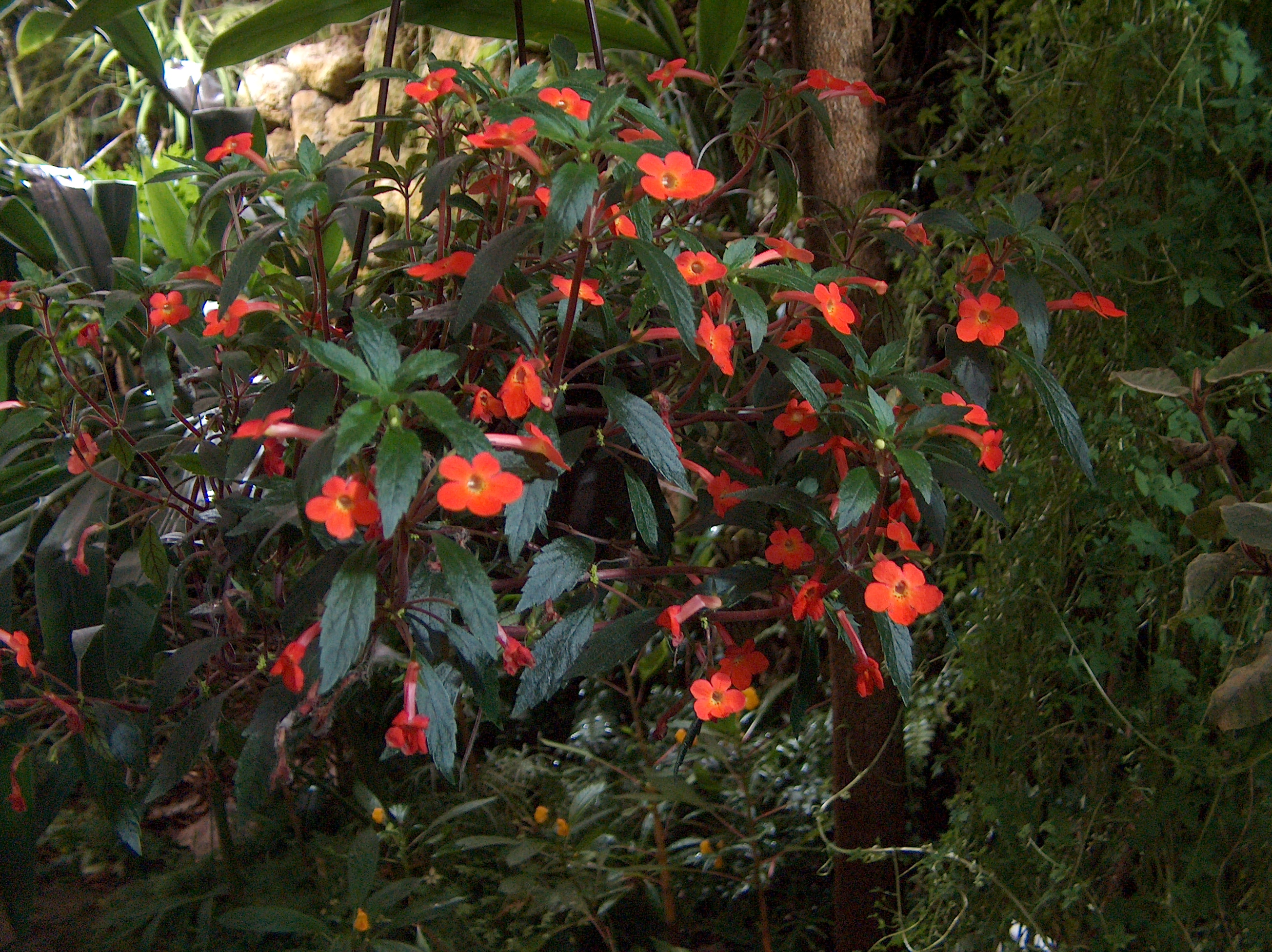 Achimenes erecta (Lam.) H. P. Fuchs